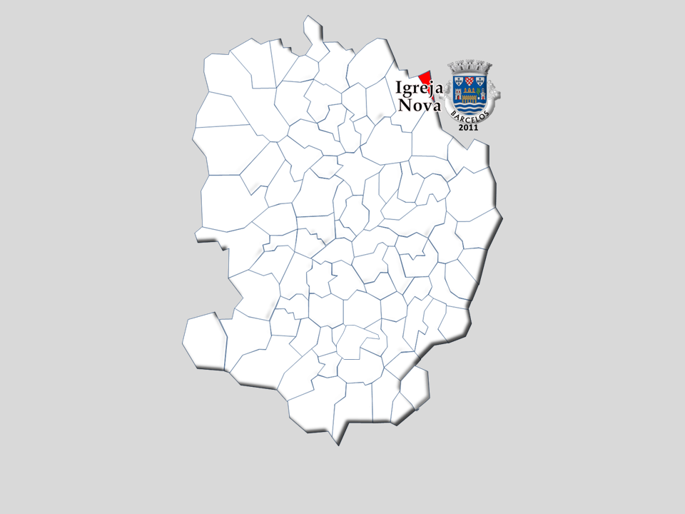 Censos 1964/2011